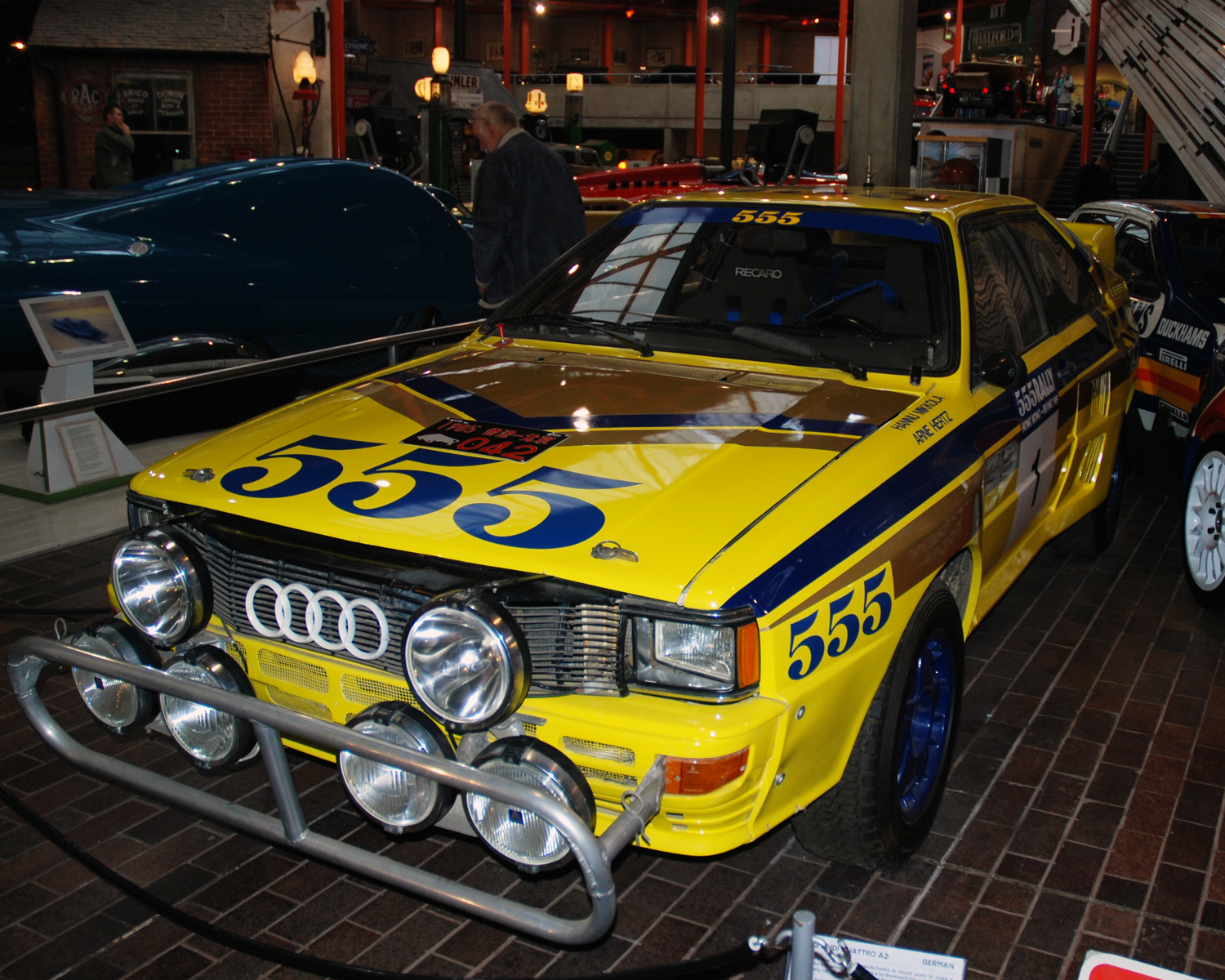 National Motor Museum,Beaulieu,Nov 2007